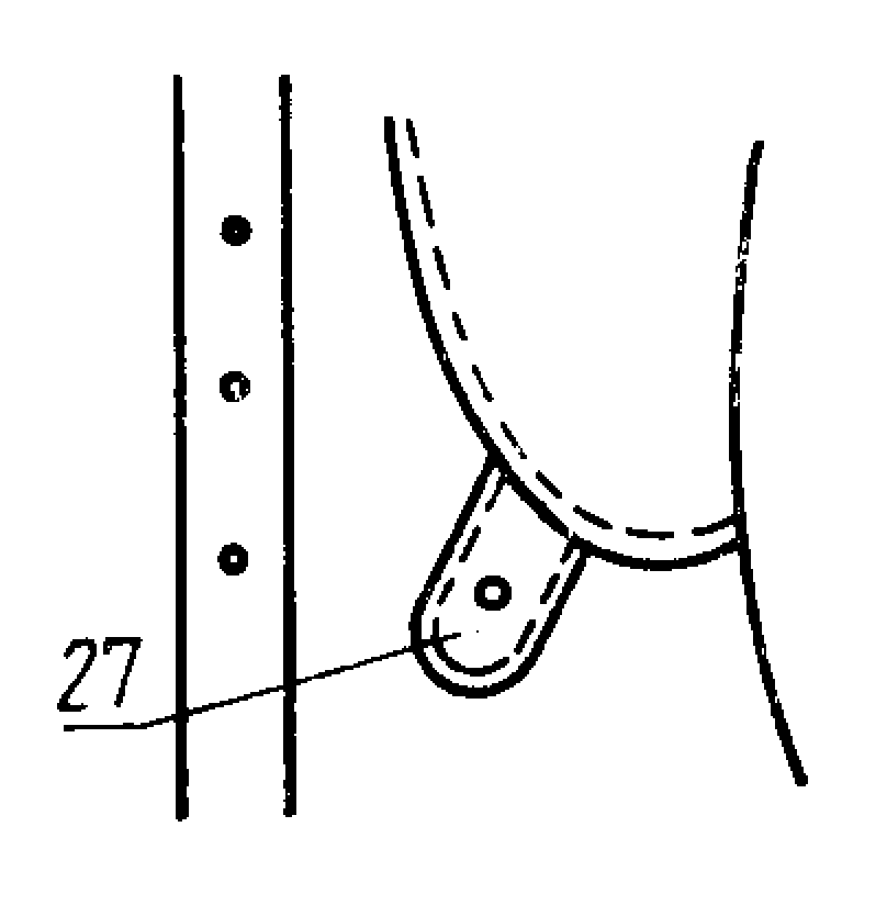 Изображение из ГОСТ 22977-89 (СТ СЭВ 6484-88) — Детали швейных изделий. Термины и определения.